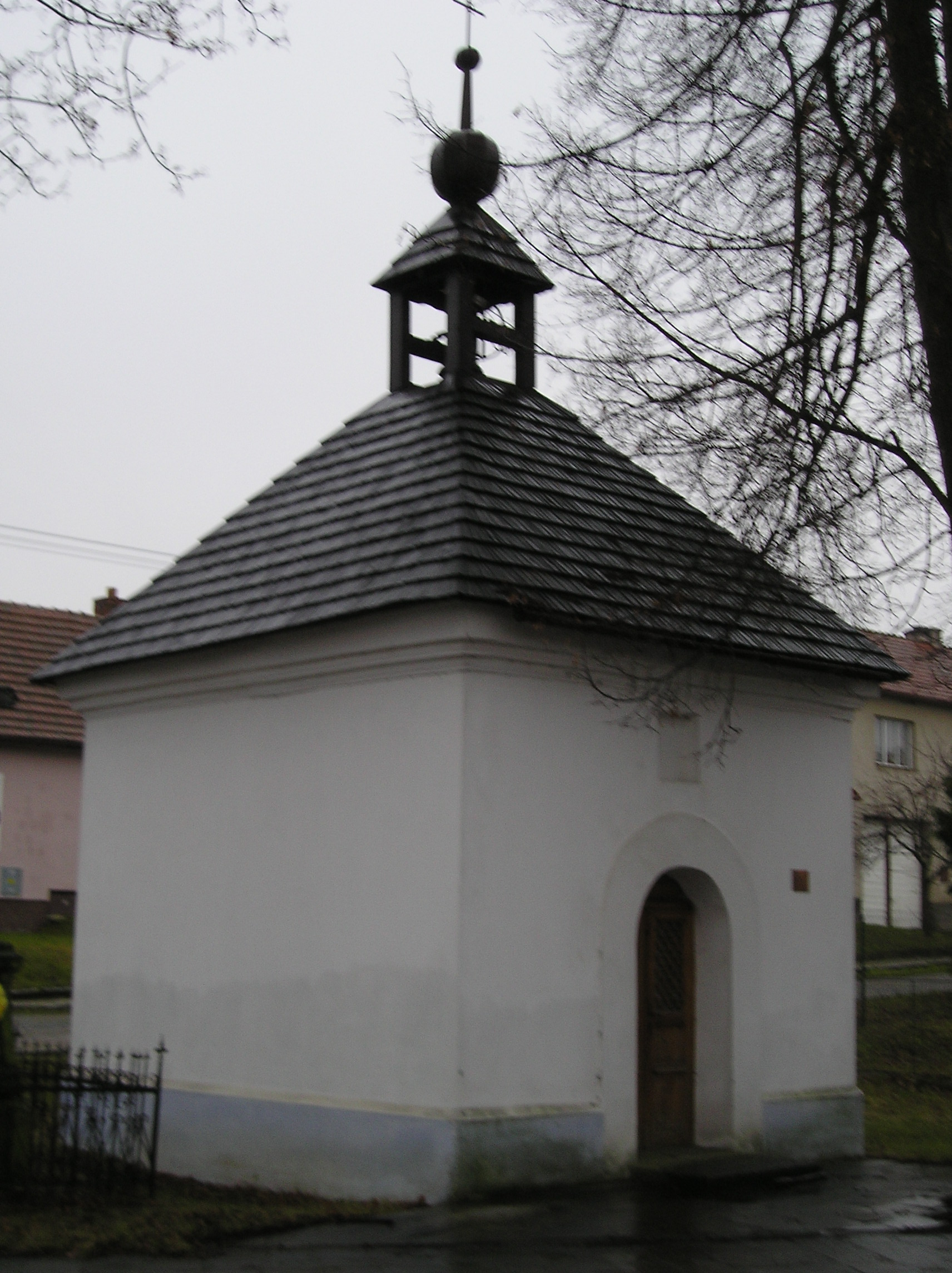 Hodovská kaple u rybníka na návsi. Zdroj: Vlastní fotoaparát Autor: Standa Jaša